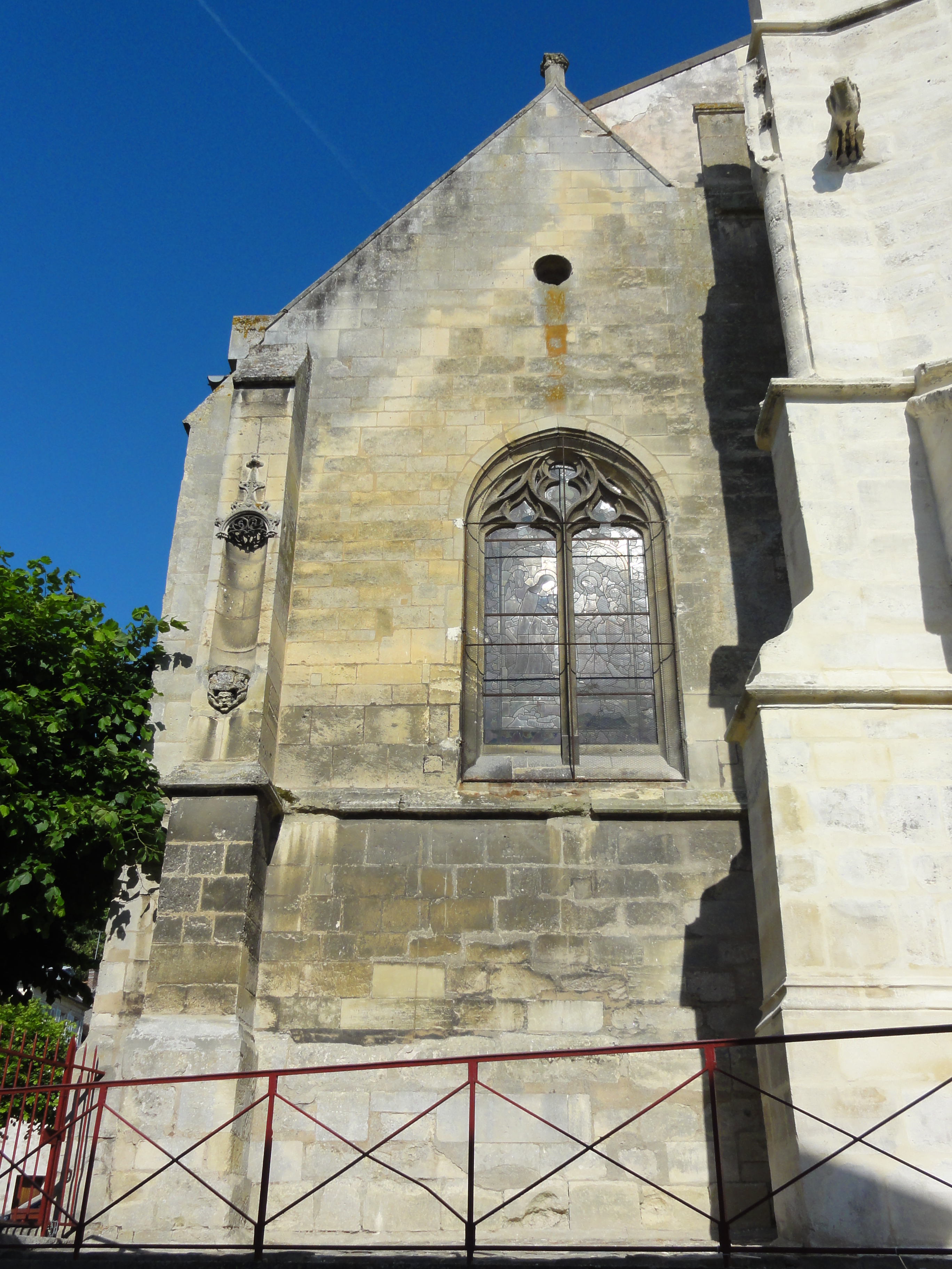 Collatéral sud, chevet.